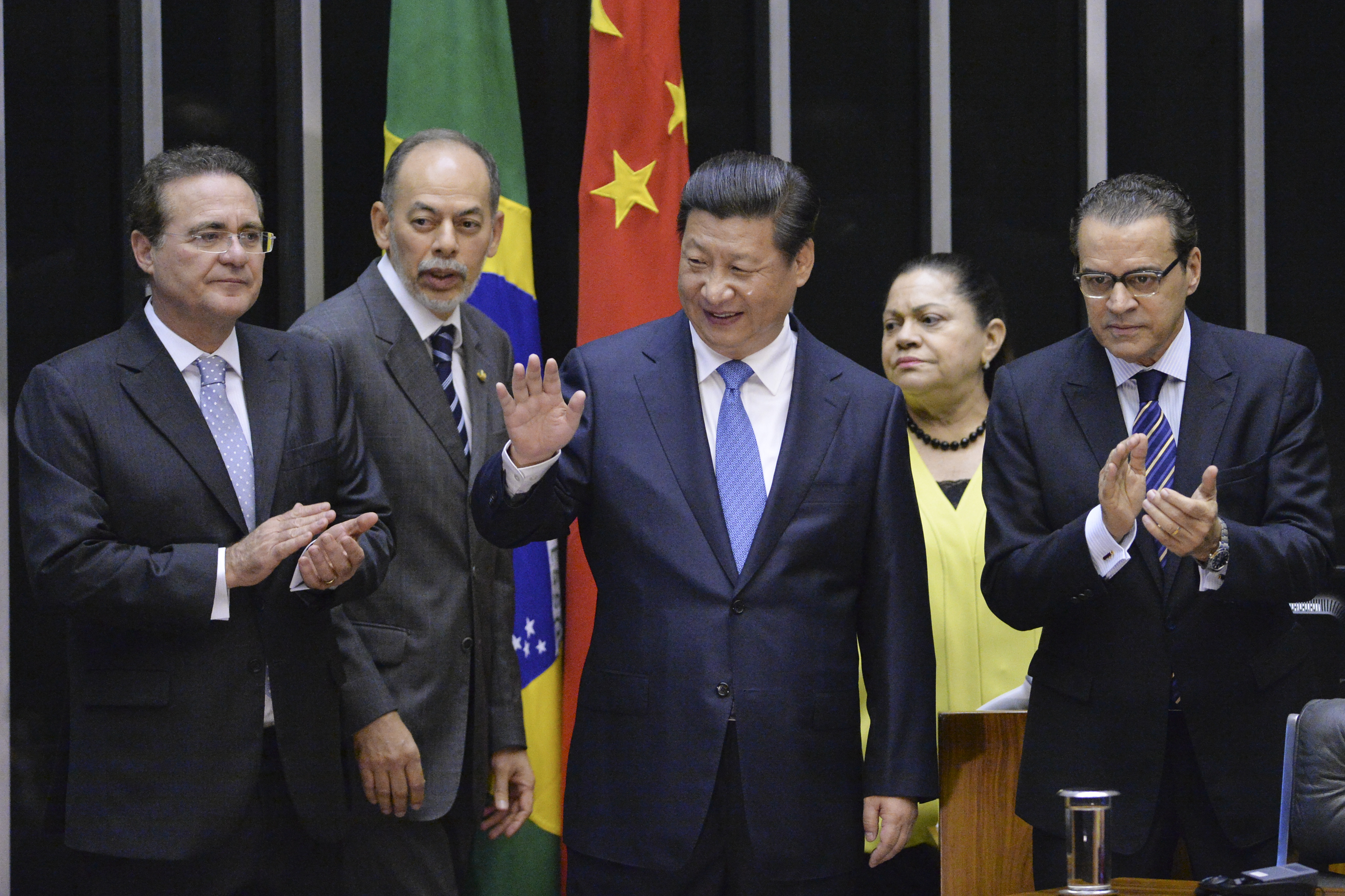 Sessão solene do Congresso Nacional destinada a recepcionar o presidente da República Popular da China, XI Jiping. Participam: os senadores Renan Calheiros (PMDB-AL), presidente do Senado, e Inácio Arruda (PCdoB-CE), e o presidente da Câmara, Henrique Alves (PMDB-RN) Foto: Edilson Rodrigues/Agência Senado